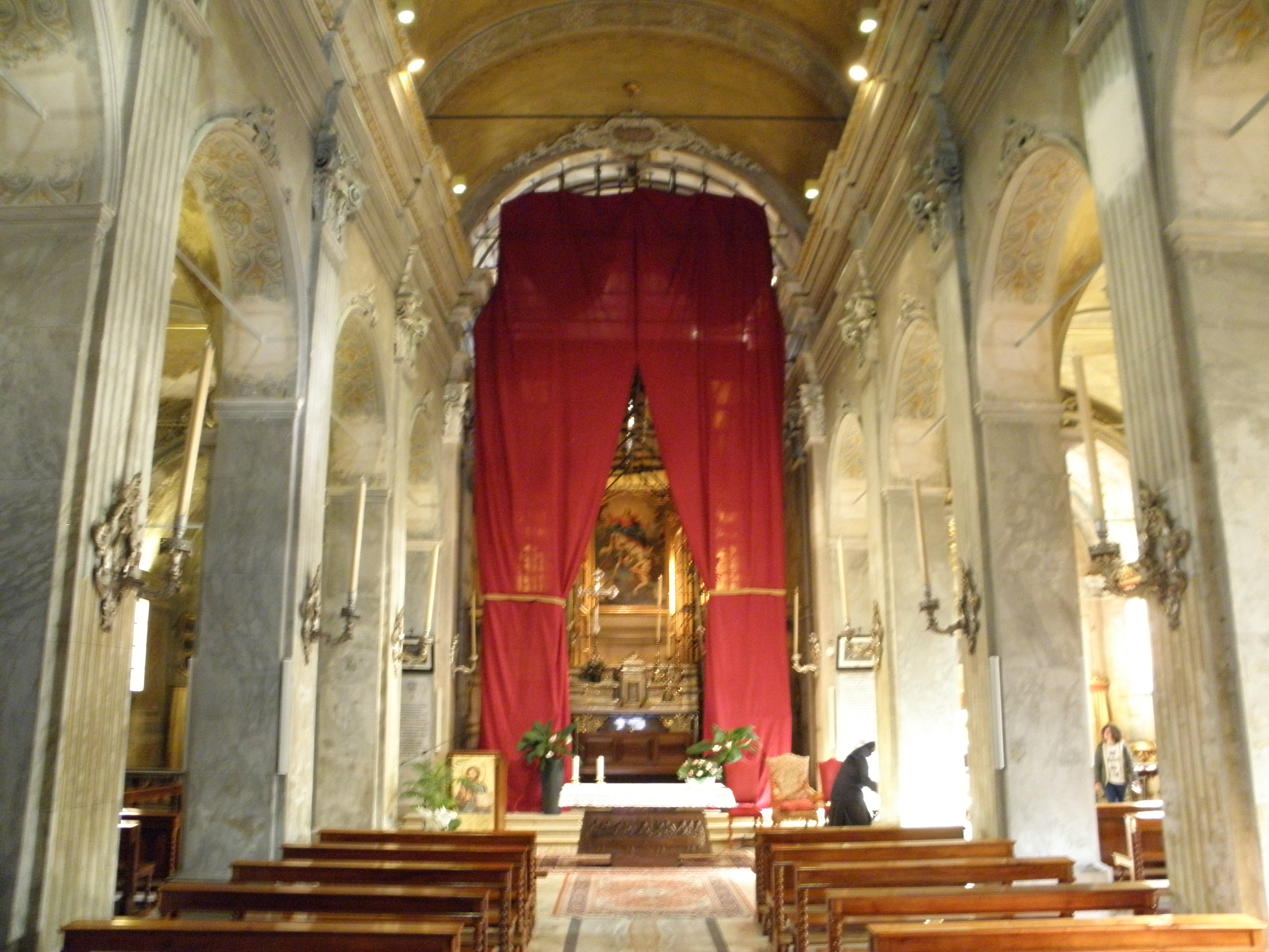 Sissa, già comune autonomo, frazione di Sissa Trecasali: chiesa parrocchiale di Santa Maria Assunta, interno.